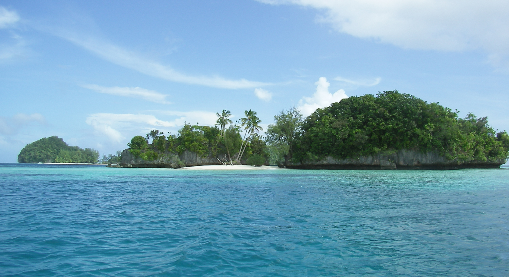 Rock-Islands, Republik Palau